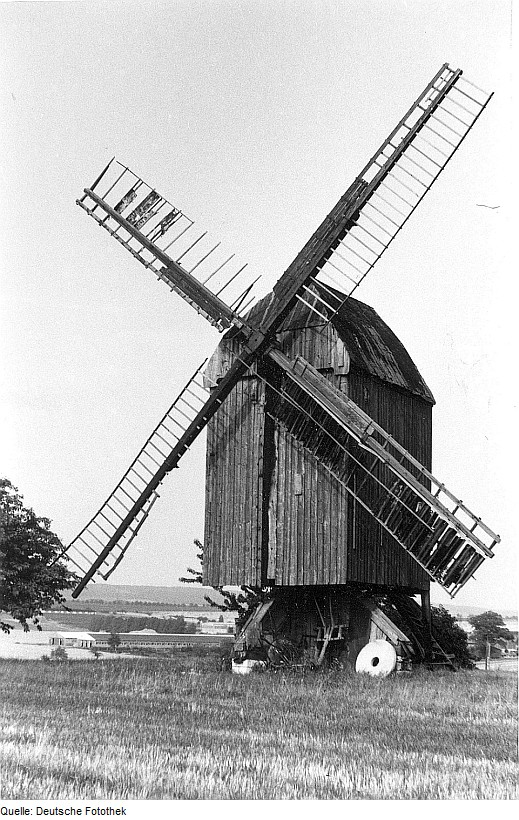 Original image description from the Deutsche Fotothek Danstedt. Mühle Ostermann oder Mühle Kampe, Bockmühle, Baujahr 1817, nach Brand 1835 Wiederaufbau